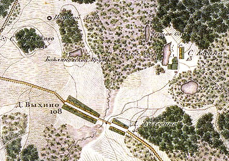 Участок. Топографическая карта окружности Москвы, снятая офицерами Квантирмейстерской части 1818 года. Гравирована и печатана в военно-топографическом бюро при главном штабе его импереторского Величества 1823 года. // Село Косино, деревни Выхино и Жулебино